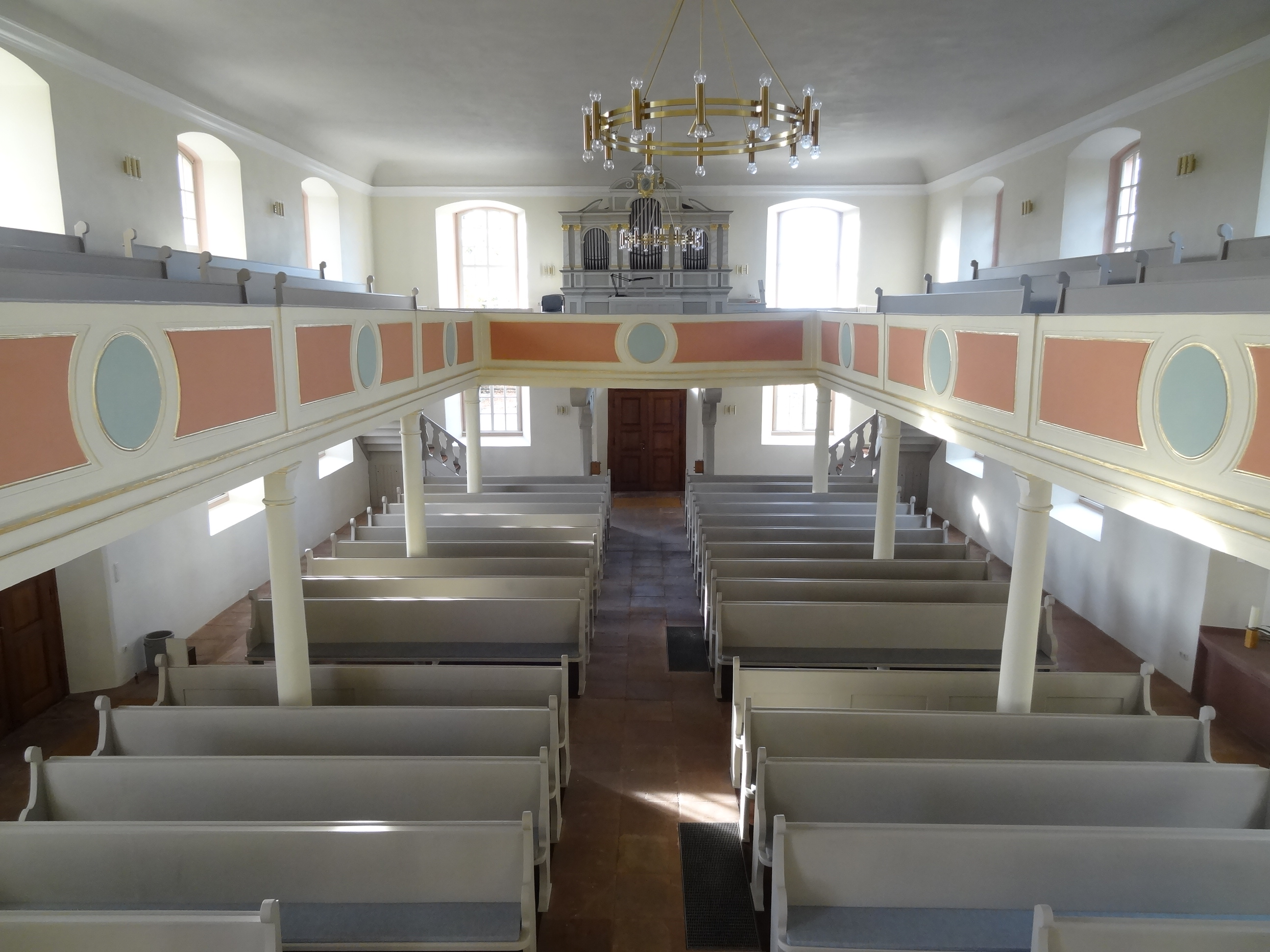 Evangelische Kirche Rodheim (Hungen)